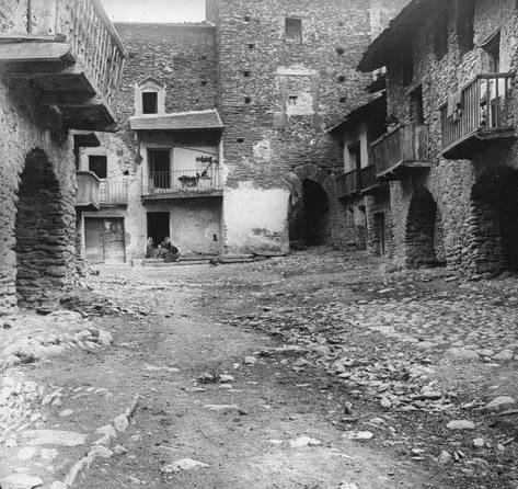 Plaça porxada d'Escaló. Frederic Bordas i Altarriba (ca. 1890)